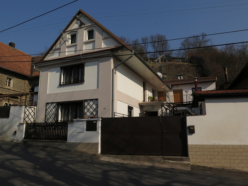 Usedlost čp. 21, Brzánky 21, Brzánky.